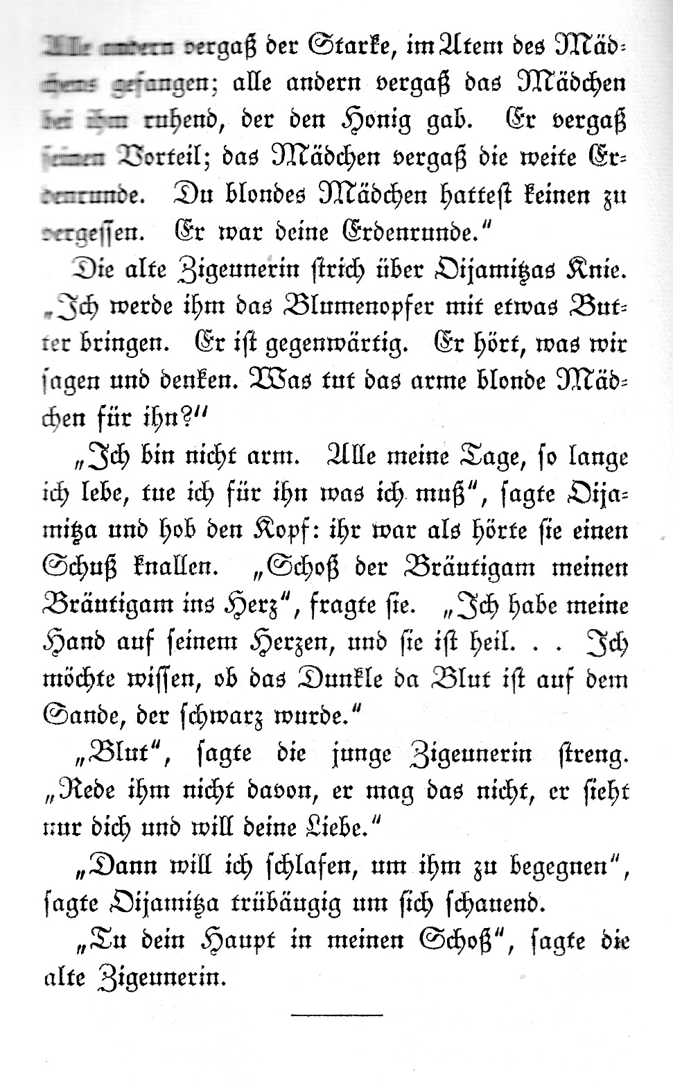 Part (the end) of the Narrative Die Abenteuer der Oijamitza, in: Elisabeth Siewert (1867–1930), Der Sumbuddawald, Ring-Verlag, Berlin 1928.